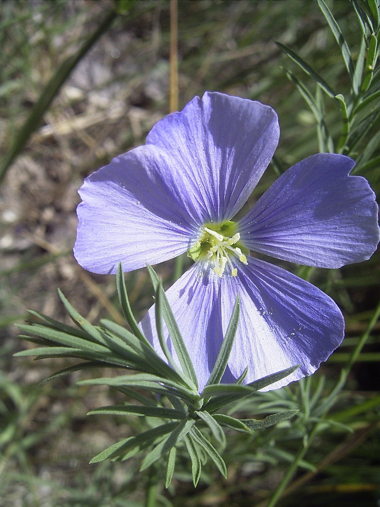 Linum austriacum at Neusiedler See, Austria